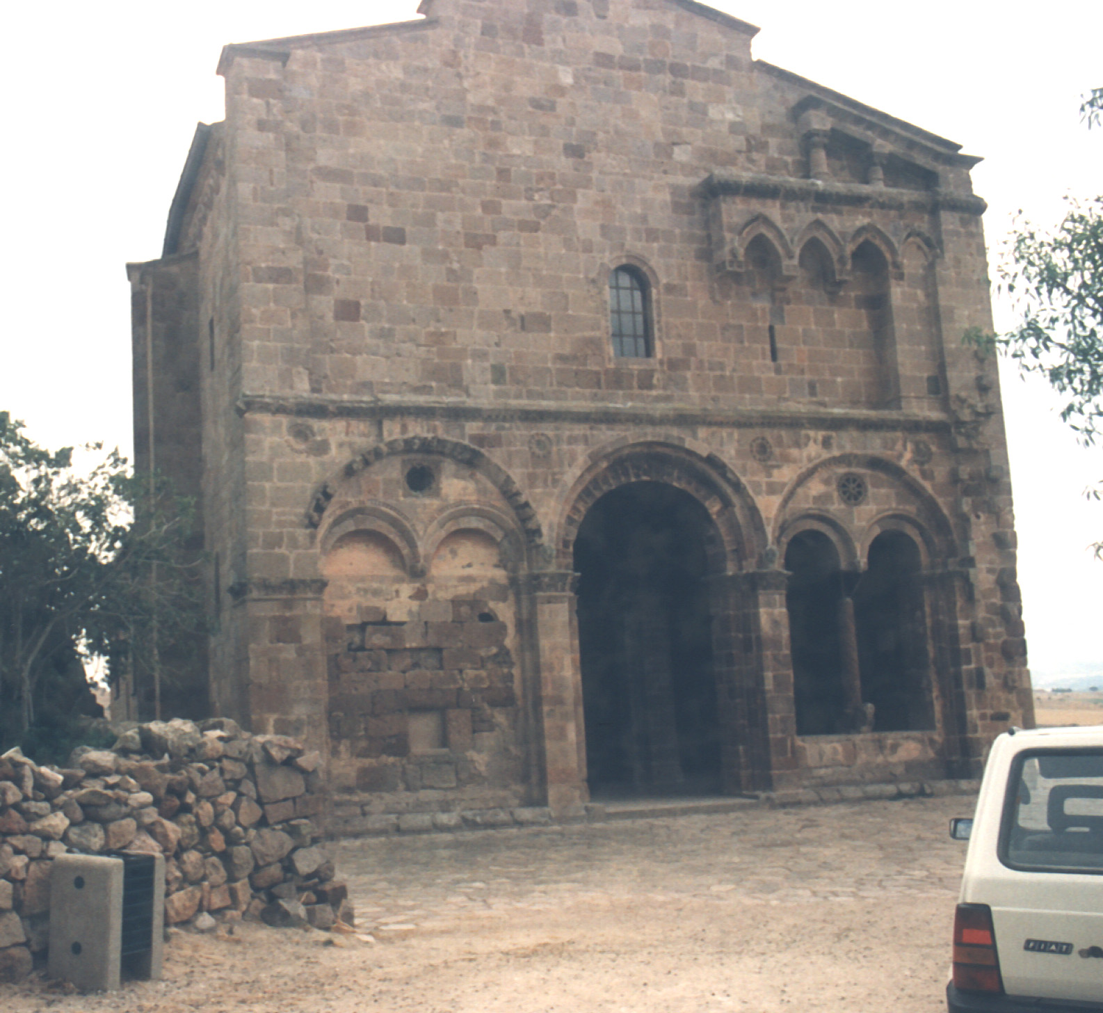 Basilica di Sant'Antioco di Bisarcio (XII secolo), presso Ozieri (SS), Sardegna